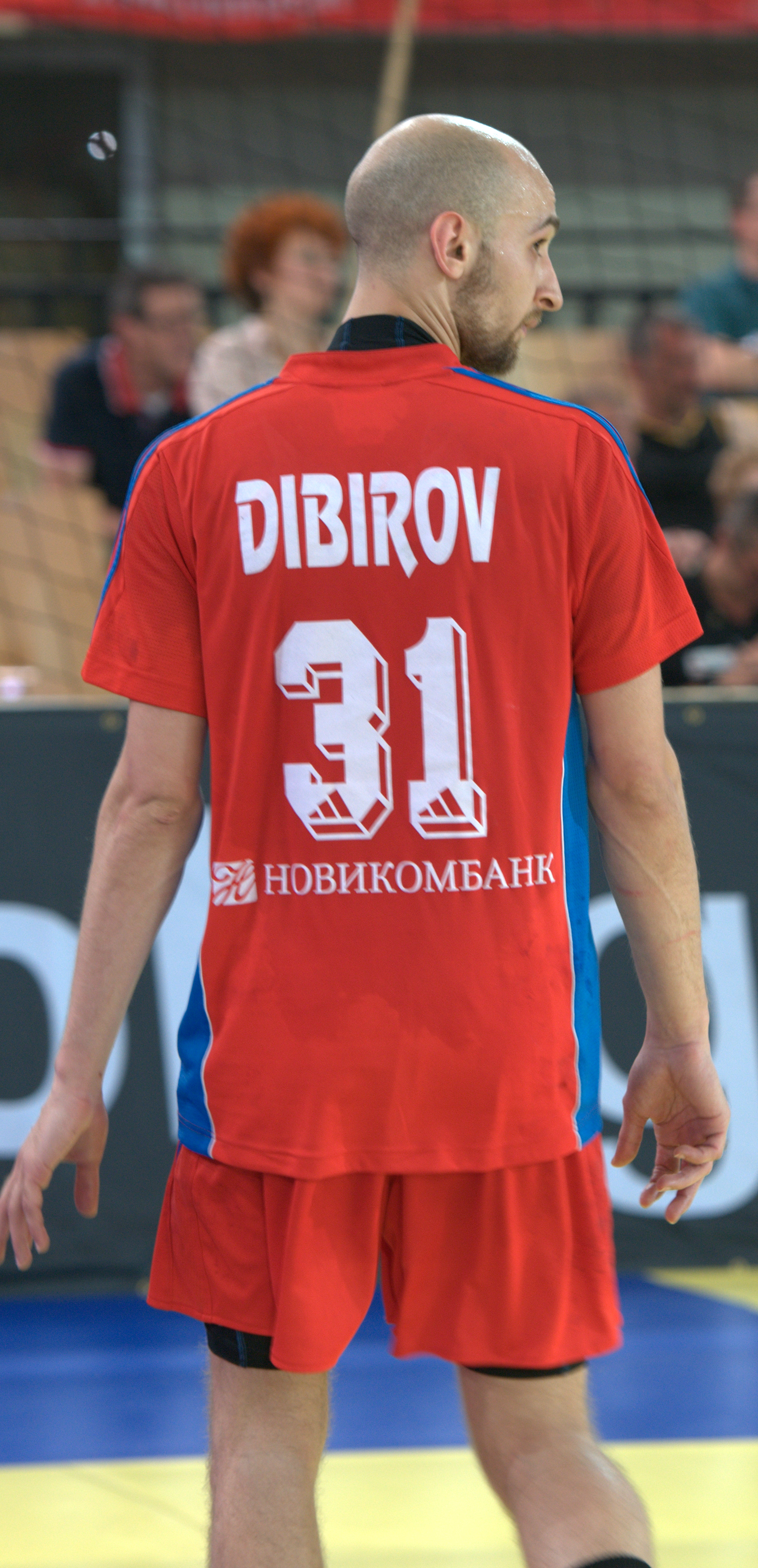 Handball EM Qualifikationspiel Österreich vs. Russland Timur Dibirow